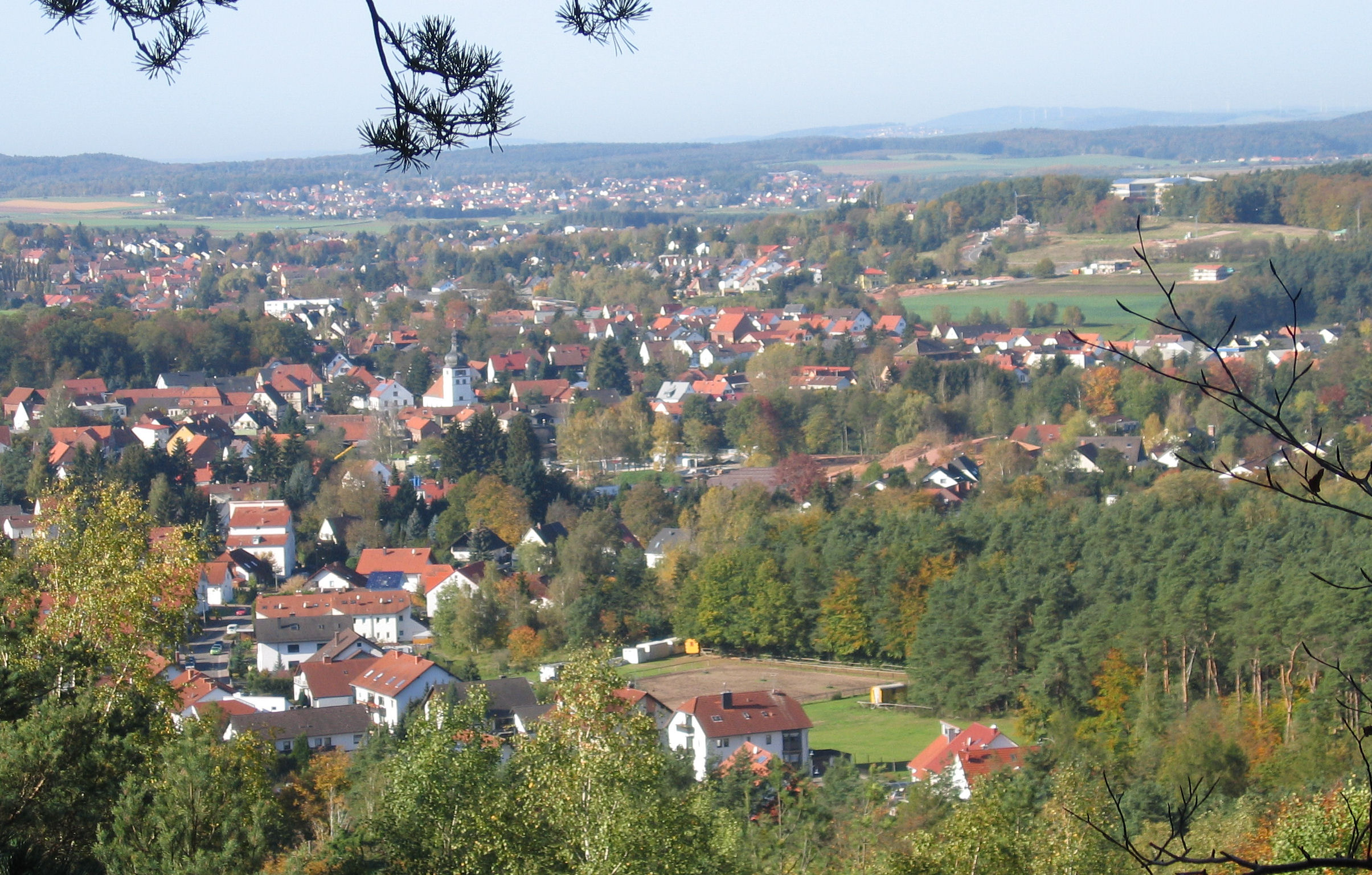 Alsenborn vom Steinbruch Leinigerstr Hans Buch 2 -- views of Alsenborn in the Rhineland-Palatinate, Germany